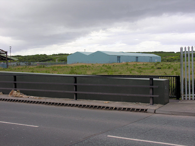 Bidston Dock (infilled)